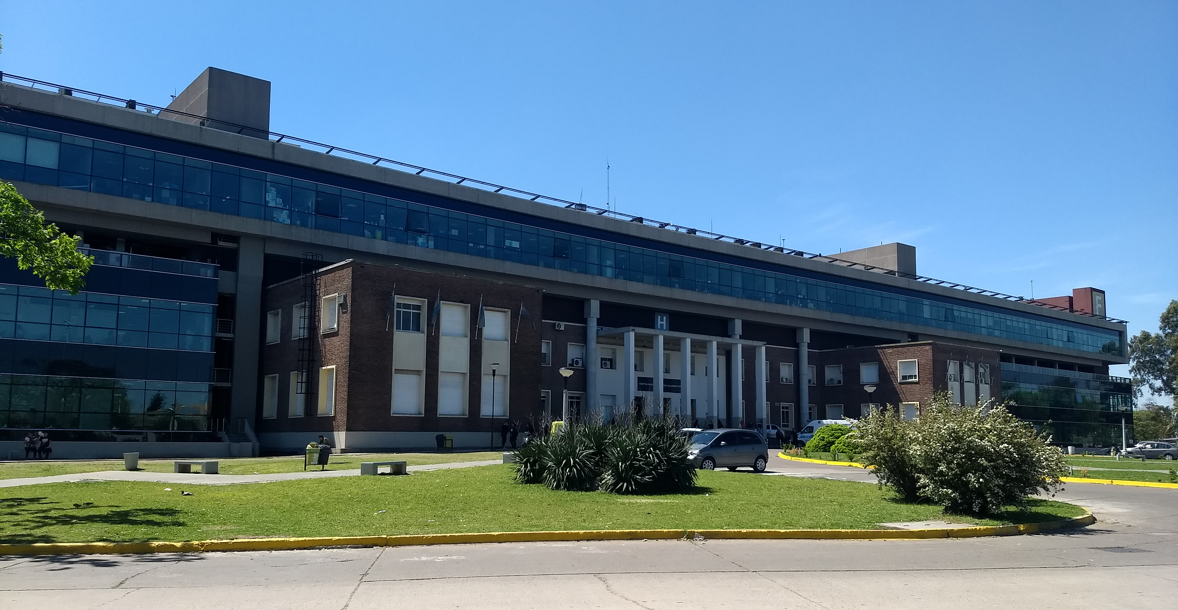 Hospital Nacional Prof. Alejandro Posadas en El Palomar, provincia de Buenos Aires, Argentina.